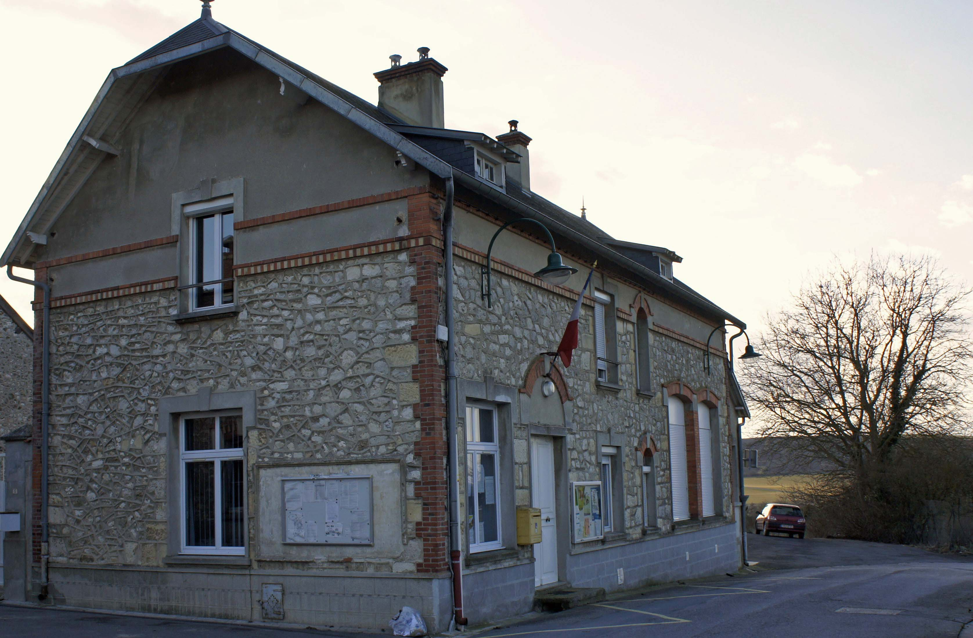 Mairie de Bligny.